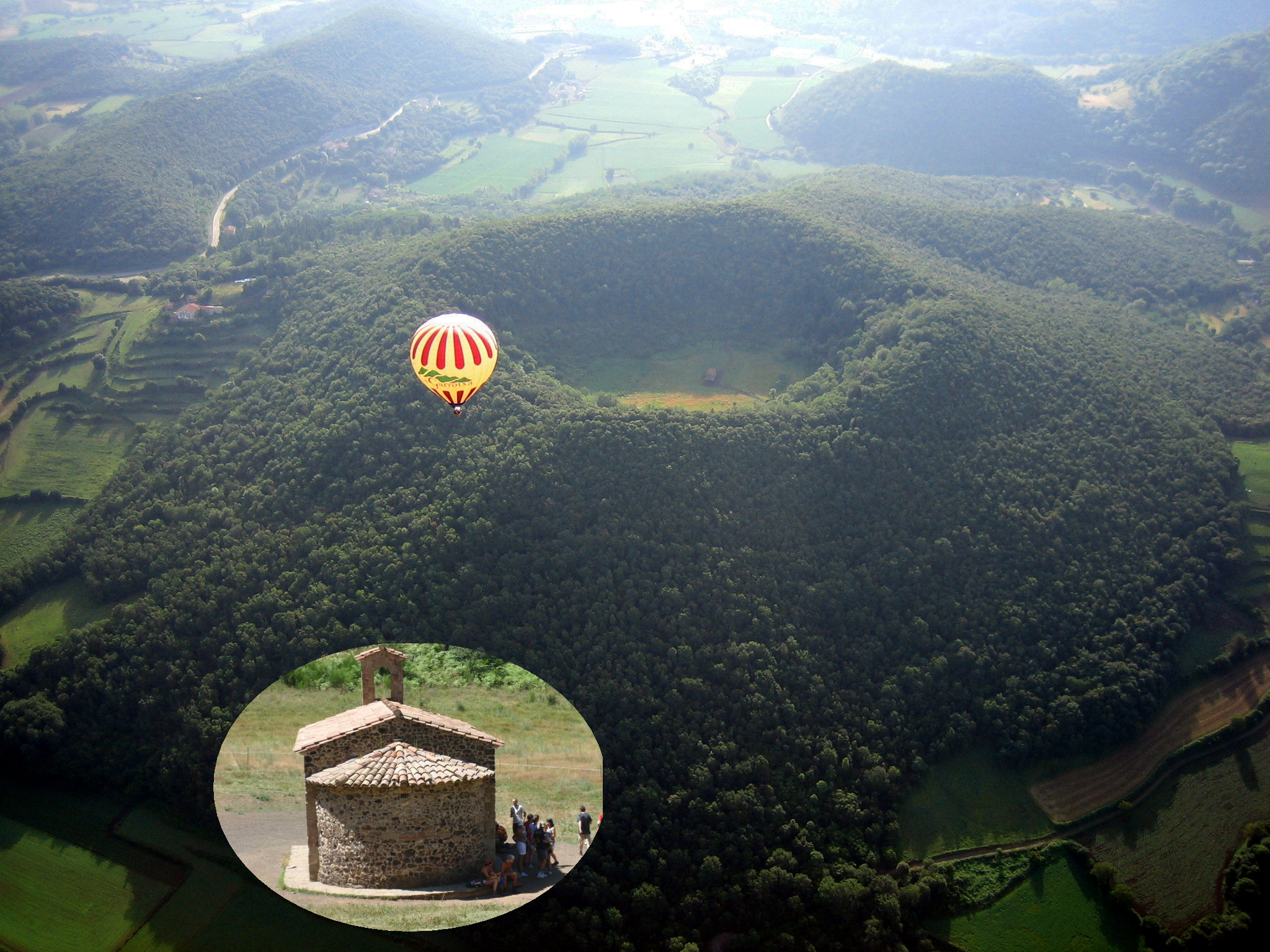 Ermita de Santa Margarida de Sacot dins del volcà de Santa Margarida a la Garrotxa